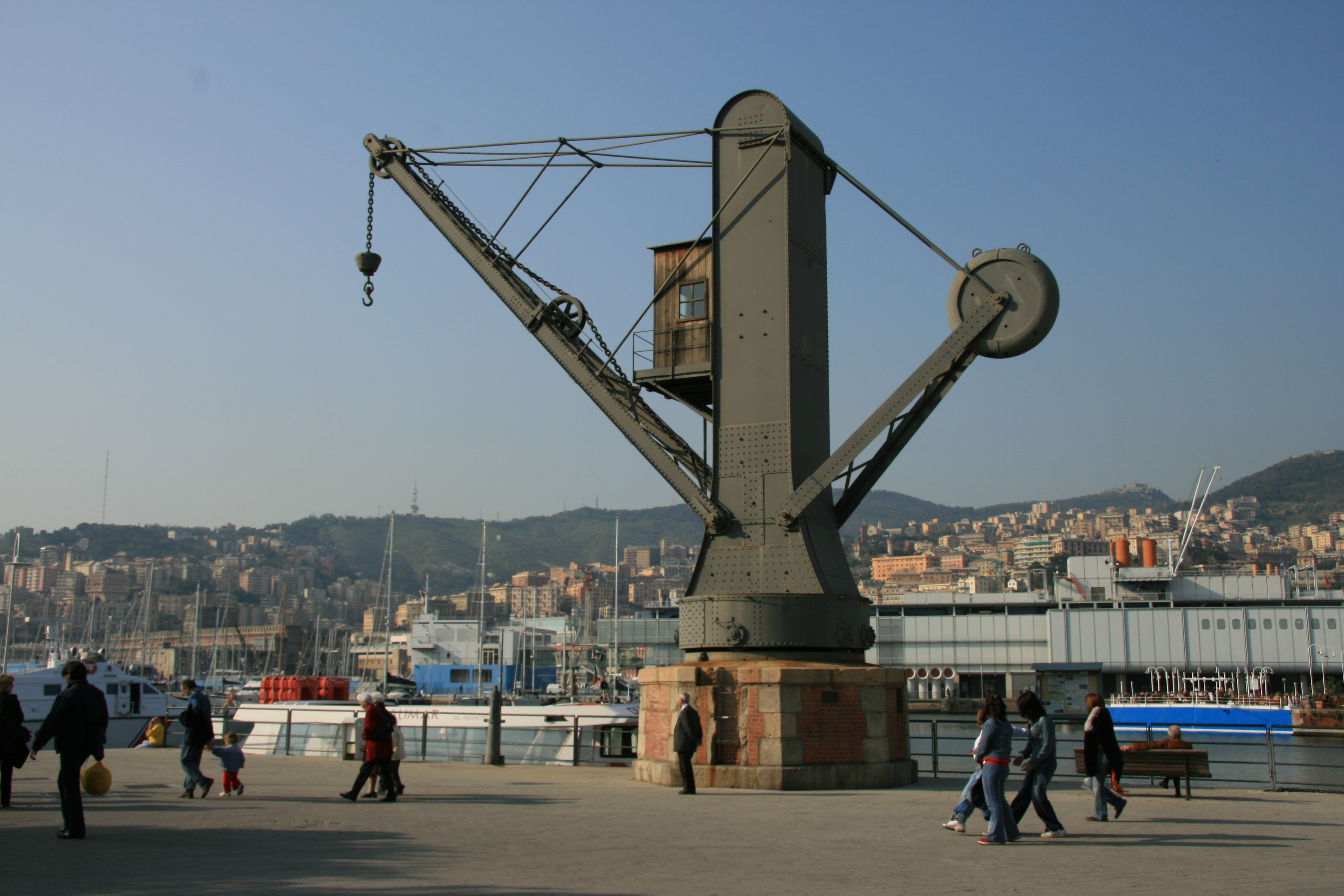 Vecchia gru nel Porto Antico di Genova